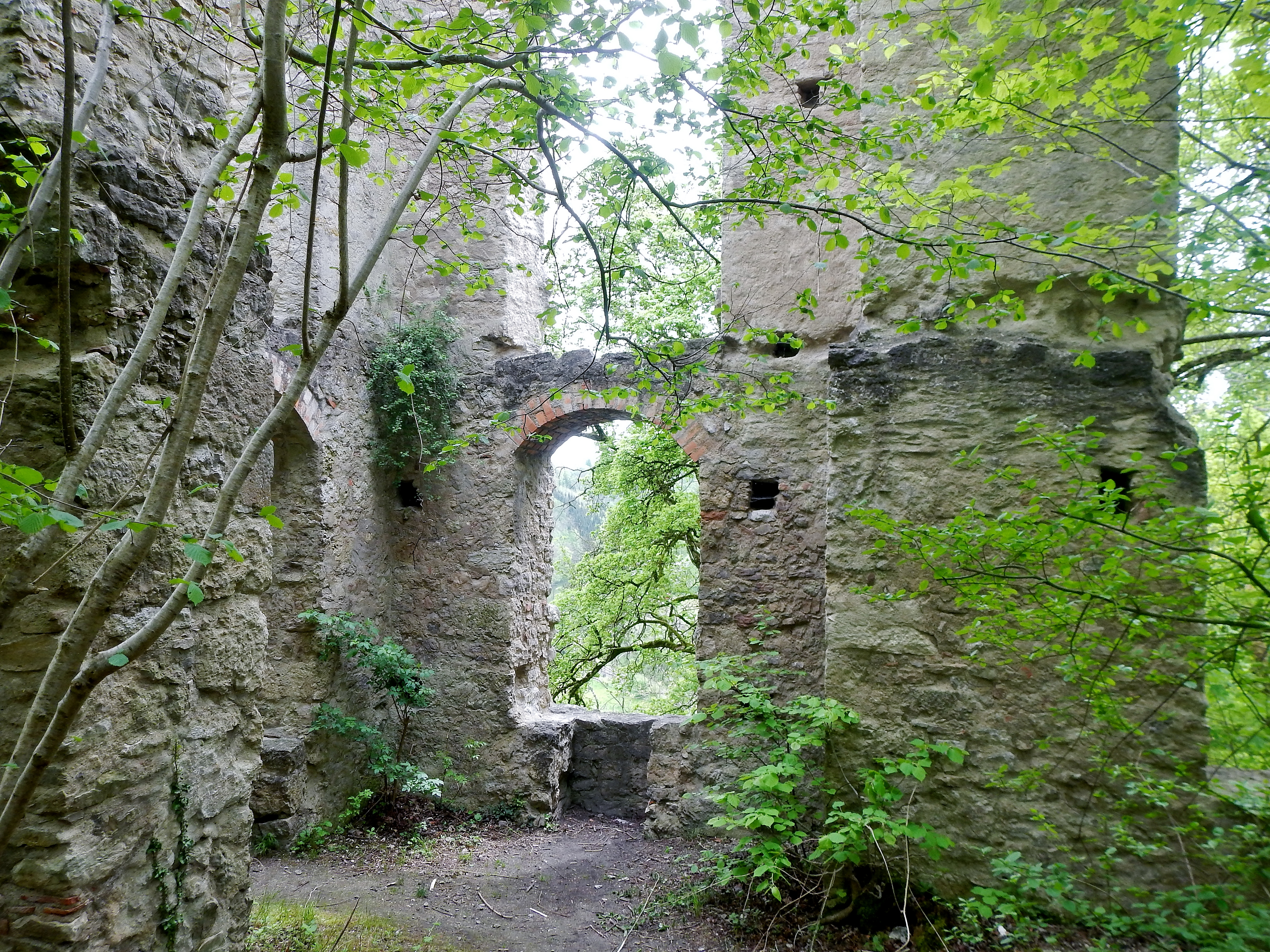 Beim 366 km langen Neckartalradweg: Neckarburg: 793 Die "Nehhepurc" wird erstmals im Besitz des Klosters St. Gallen erwähnt - 1275: Die Neckarburg erscheint mit eigener Pfarrkiche und eigenem Geistlichlen - 1589: Die Spreter von Kreidenstein kaufen die Neckarburg aus dem Vorbesitz der Grafen von Sulz und bauen Sie neu als Schloss